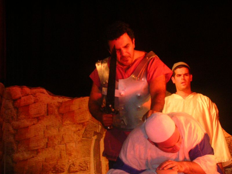 עופר גורן בהצגה יודפת של תיאטרון תאיר